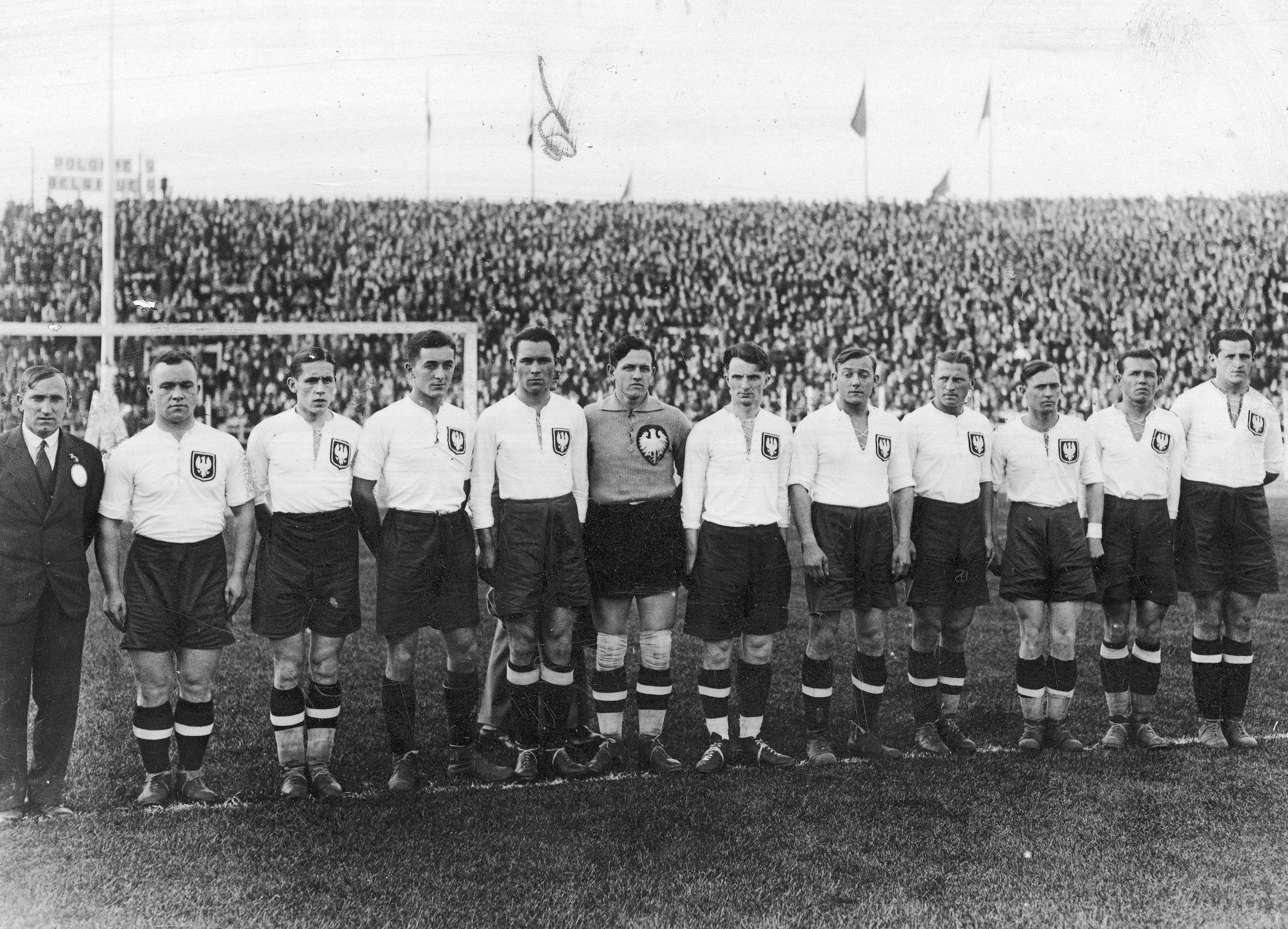 Drużyna Polski. Widoczni m.in.: kapitan Jerzy Bułanow (4. z prawej), Józef Kotlarczyk (2. z prawej), Franciszek Wilczkiewicz, Aleksander Mysiak (4. z lewej), Karol Kossok (1. z prawej), Karol Pazurek (5. z prawej), Witold Wypijewski, Józef Nawrot (7. z lewej), Marian Fontowicz (6. z lewej), Henryk Martyna (2. z lewej), Władysław Szczepaniak, trener Józef Kałuża (1. z lewej).